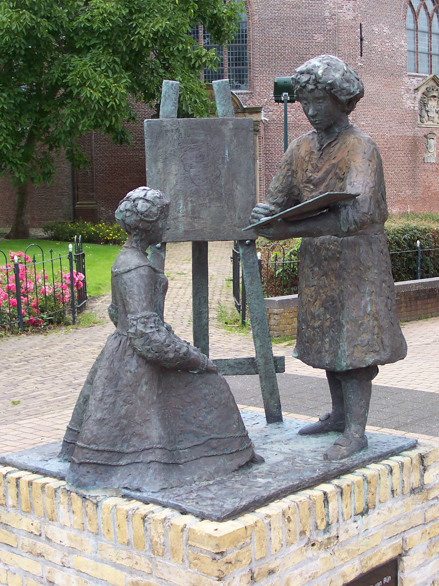 Sint Anna, brûnzen byld fan de skilder Rembrandt fan Ryn en syn wiif Saskia fan Uylenburgh. It byld is makke troch Suze Boschma-Berkhout